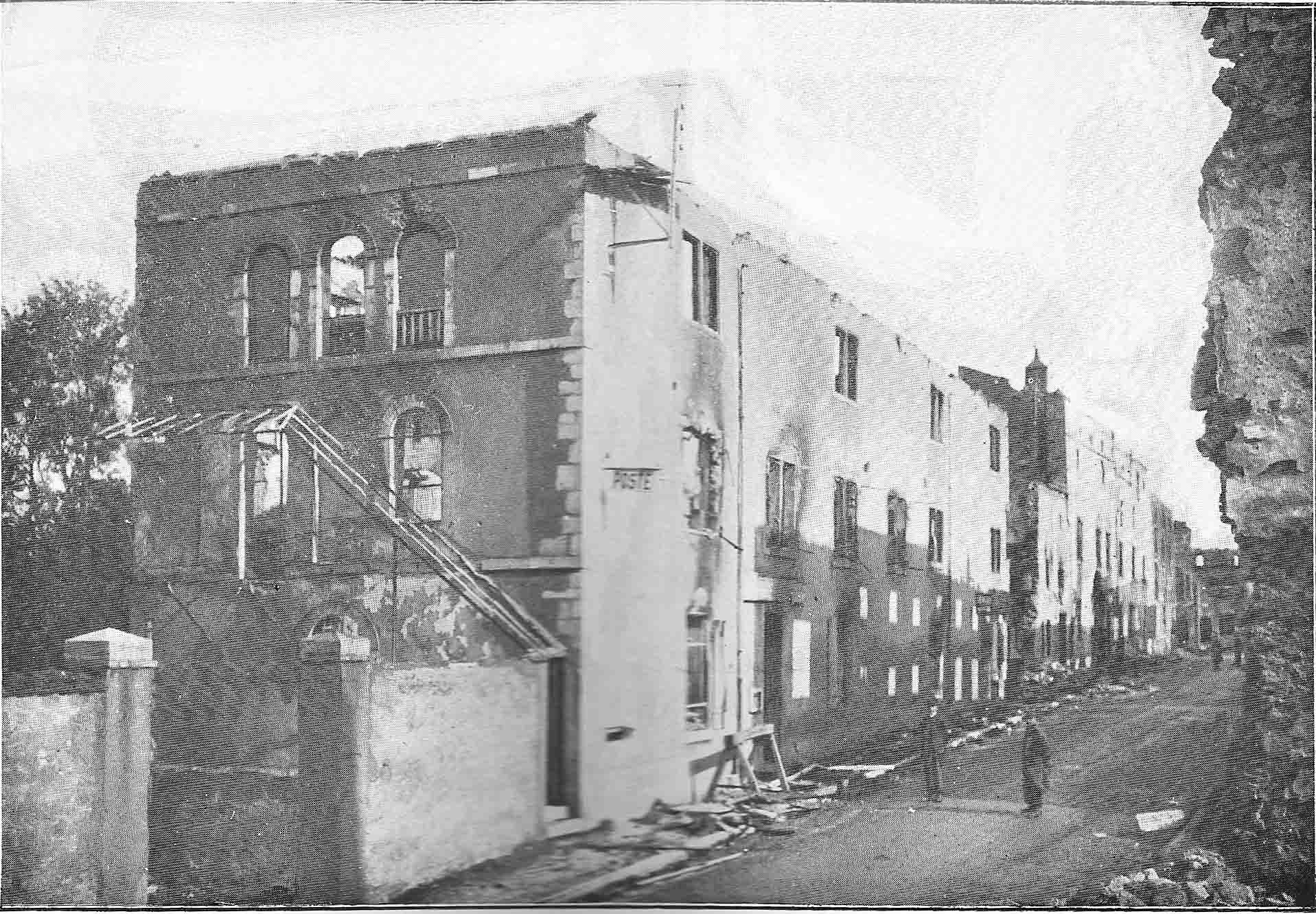 La rue Carnot (anciennement rue de la poste) et la poste de Gerbéviller (nom du fichier erroné). Dégâts de la Première Guerre mondiale.